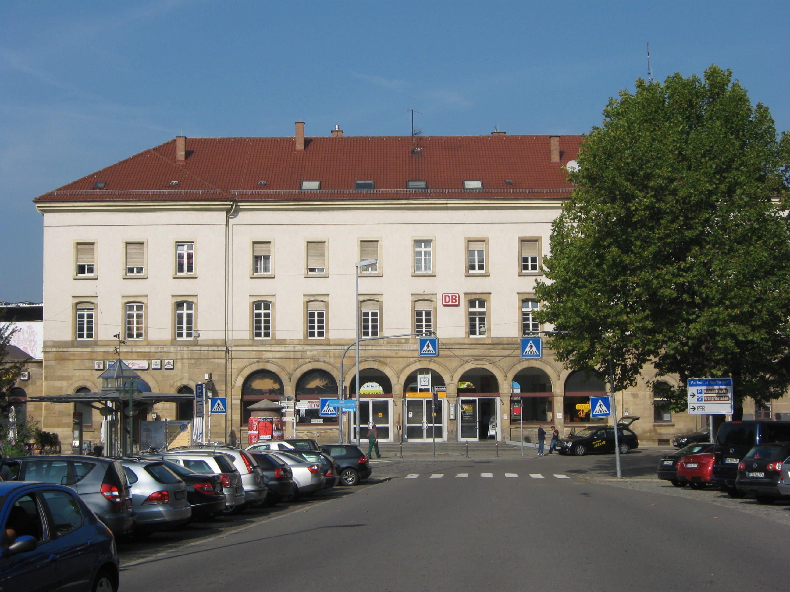 Das Bahnhofsgebäude in der Bahnhofstr. 3 in Reutlingen wurde 1858 von Joseph Schierholz geplant.